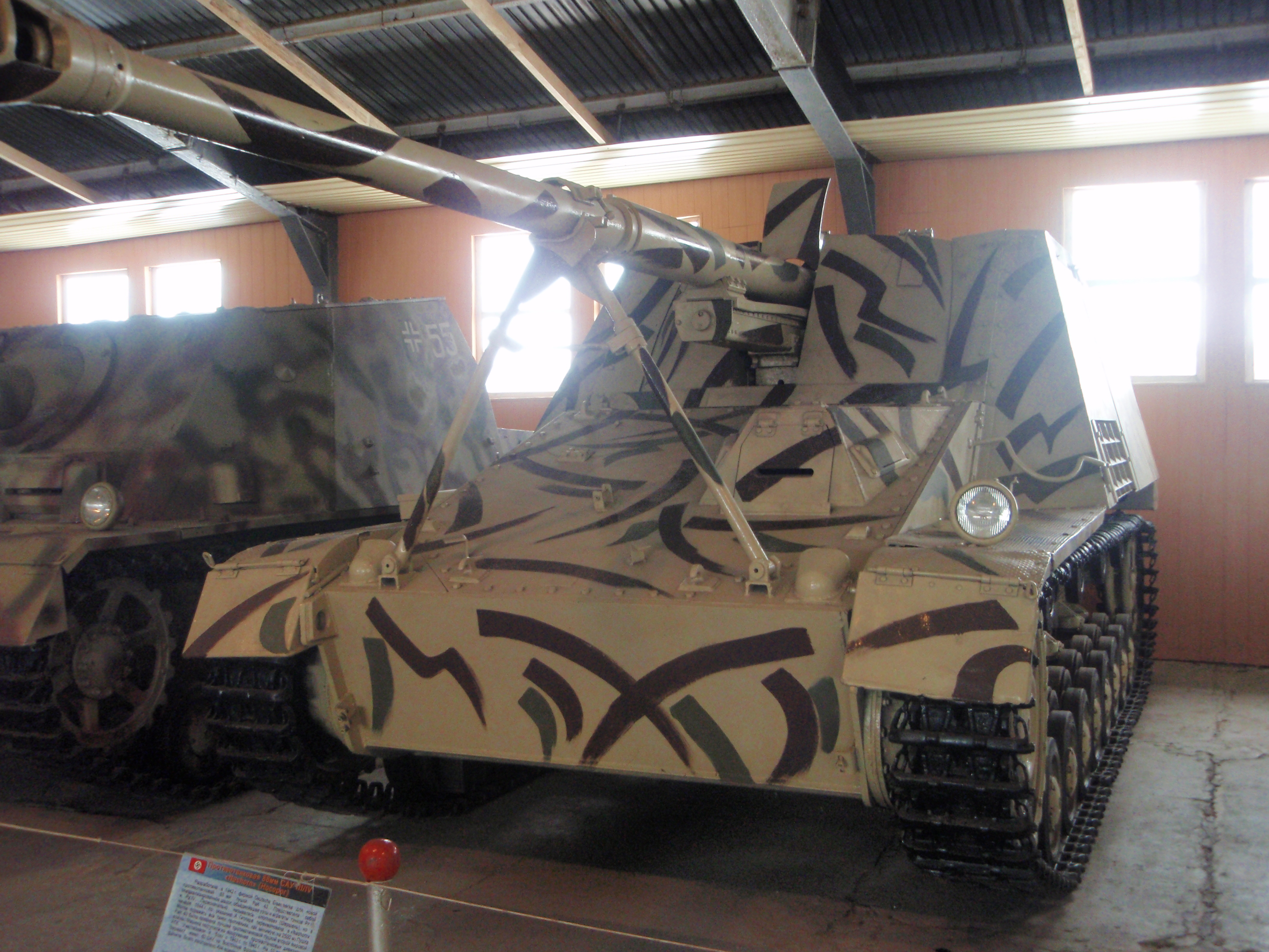 Немецкая САУ Nashorn в Кубинке